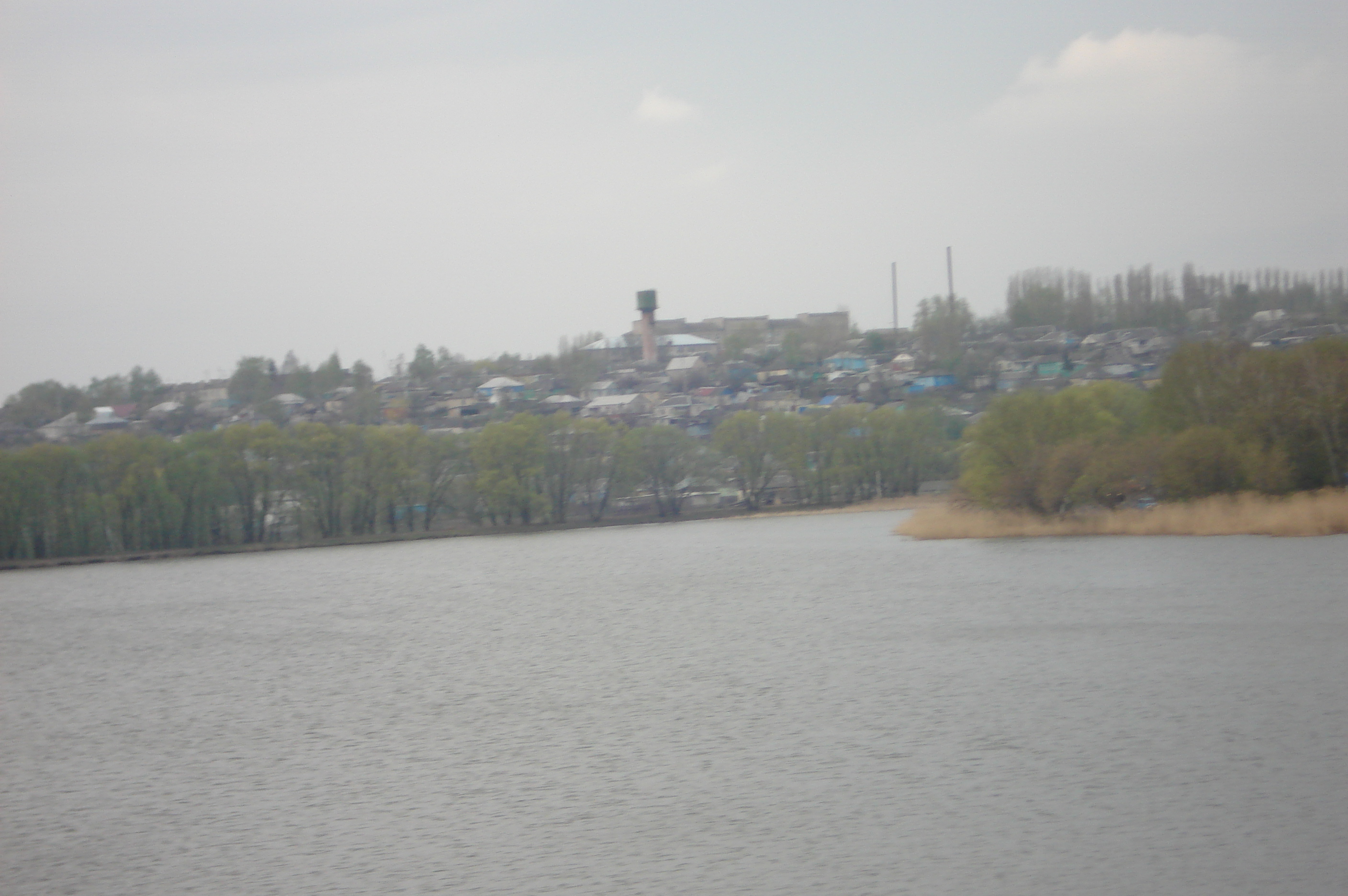 Панорама Нижнедевицка